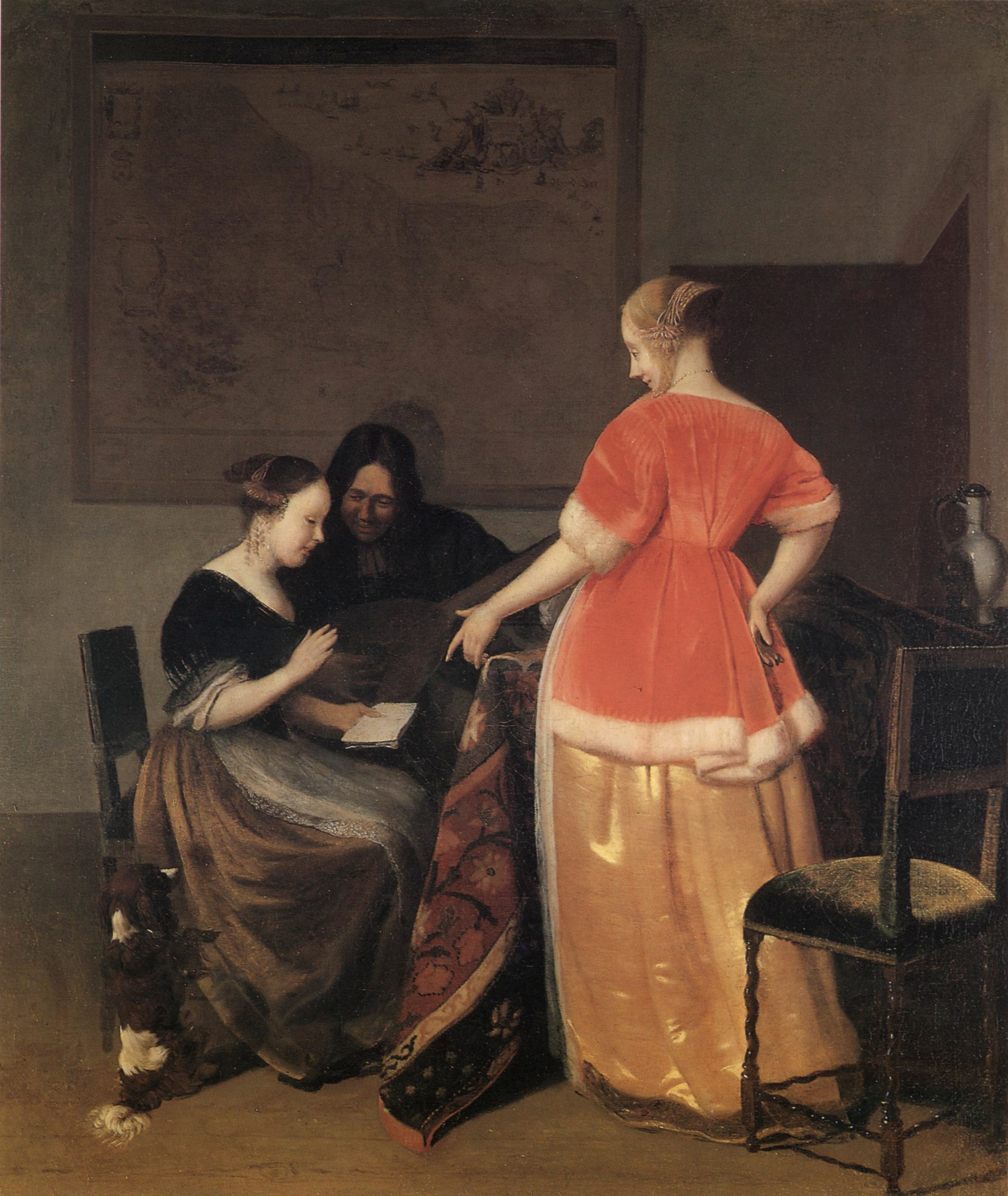 detail